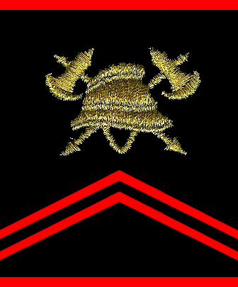 Korporaal